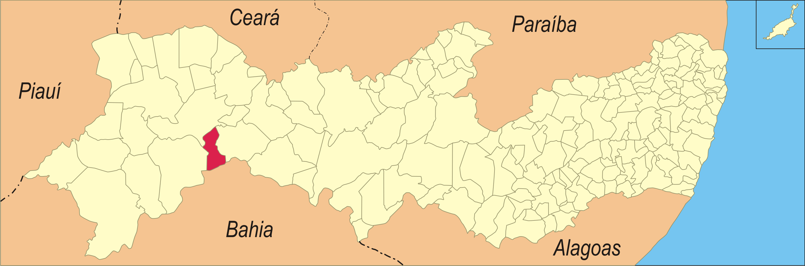 Localização da cidade em Pernambuco